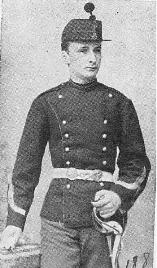 1885 - Vintilă Brătianu (România) la vârsta de optsprezecede ani, pe timpul stagiului militar